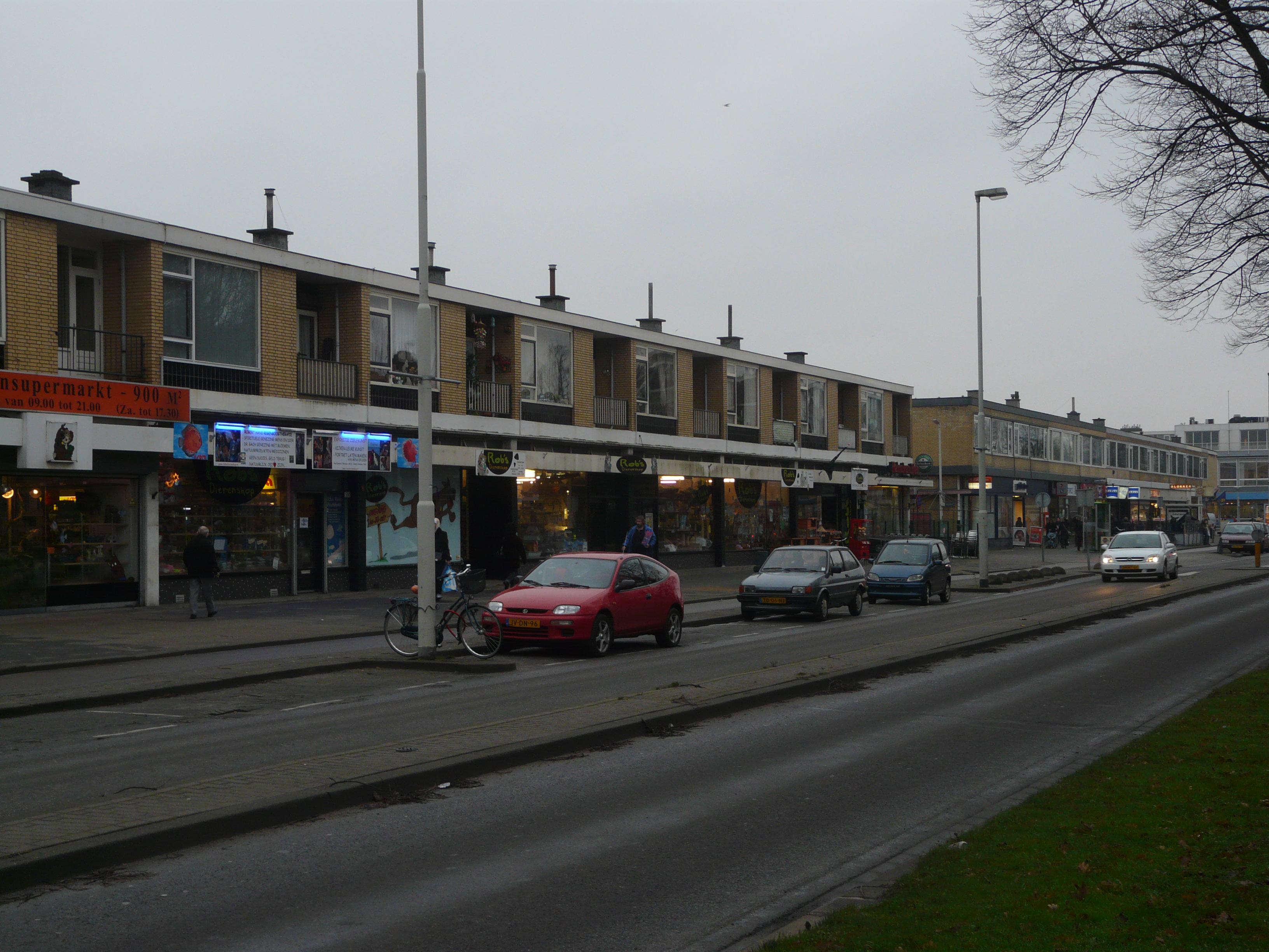 Slinge een belangrijke en lange doorgaande straat met winkels en woningen ter hoogte van de wijk Pendrecht.